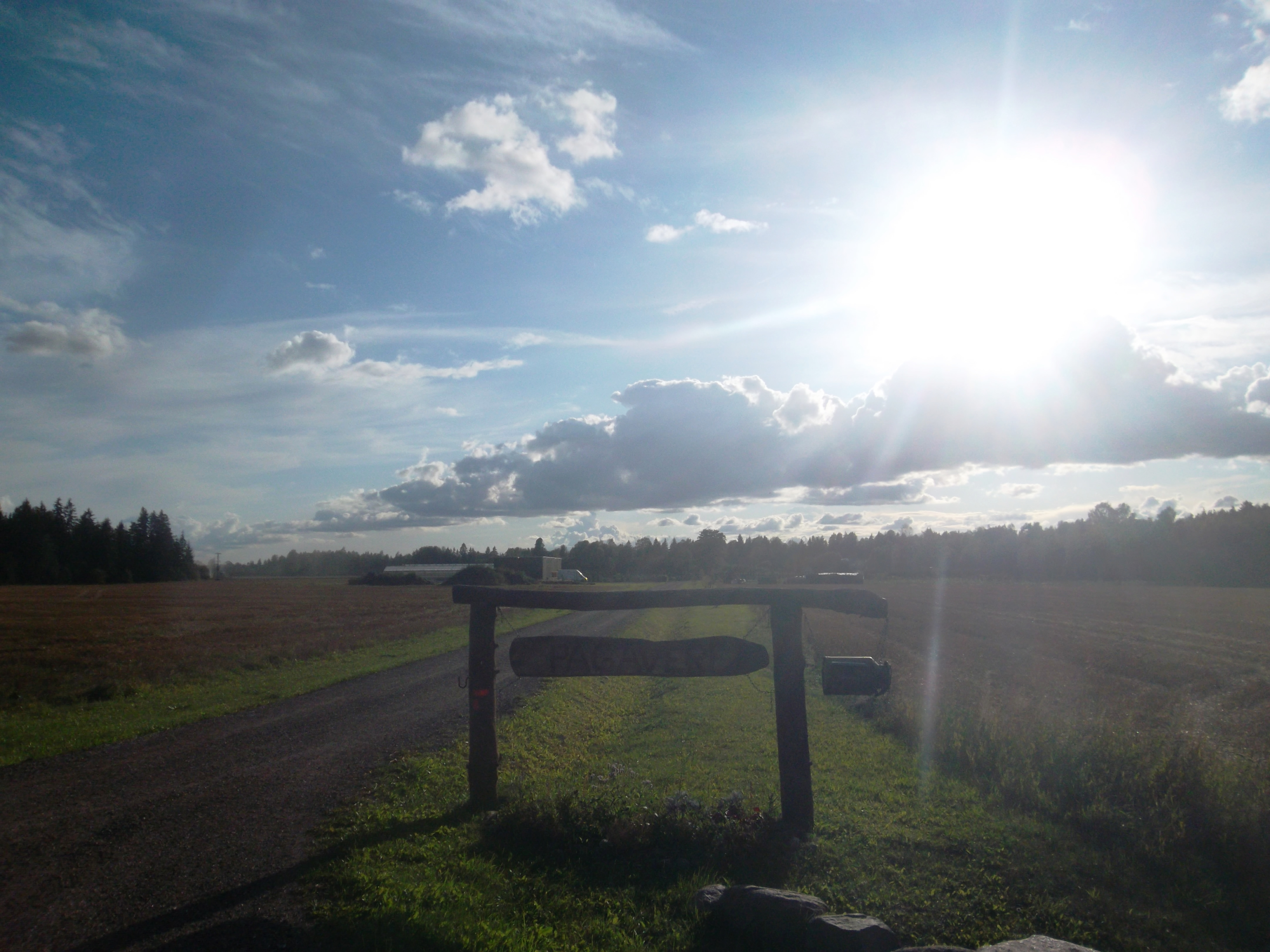 Вана-Аэспа.